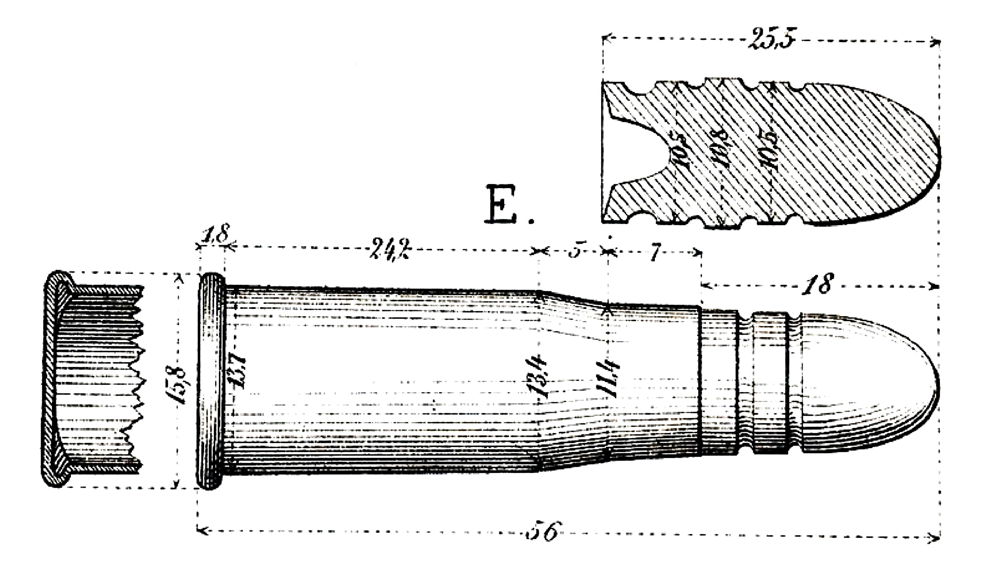 Plan de la cartouche 10.4mm Vetterli ordonnance de 1869